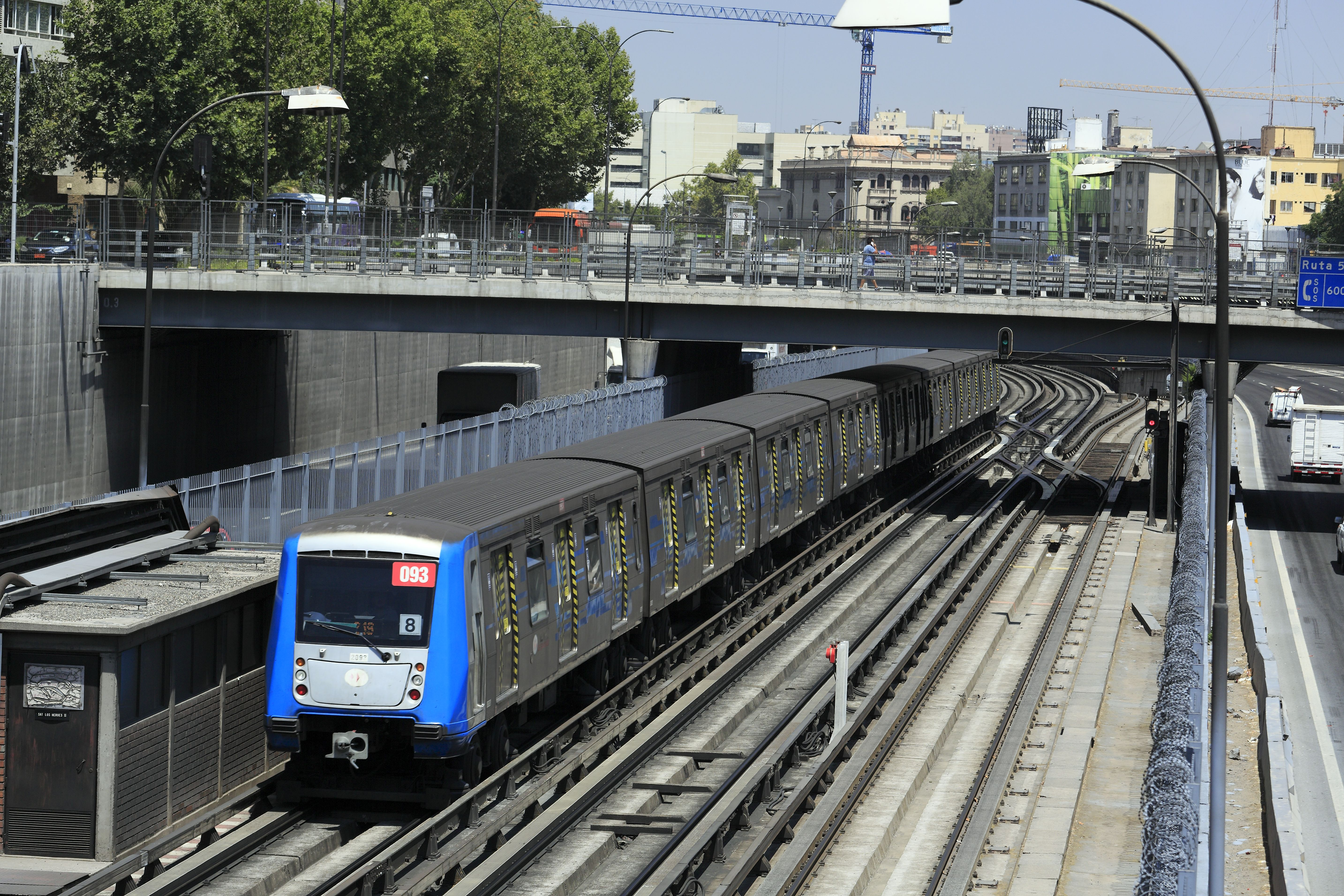 Von der Brücke der Calle Agustinas Richtung Süden, die Brücke im Bild ist die der Calle Moneda. Die nach Pariser Vorbild mit zusätzlichen Laufbahnen für Gummireifen ausgerüstete Strecke verläuft hier auf dem Mittelstreifen der »Autopista central«. Der Zug fährt nordwärts nach Vespucio norte. Das zusätzliche Gleis rechts mit nur einseitiger Führungs- und Stromschiene ist eine Verbindung mit und zwischen den Linien 1 unter der Avenida Alameda und der Linie 5 unter der Calle Catedral.